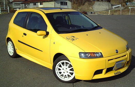 Fiat Punto HGT Abarth (Japan)